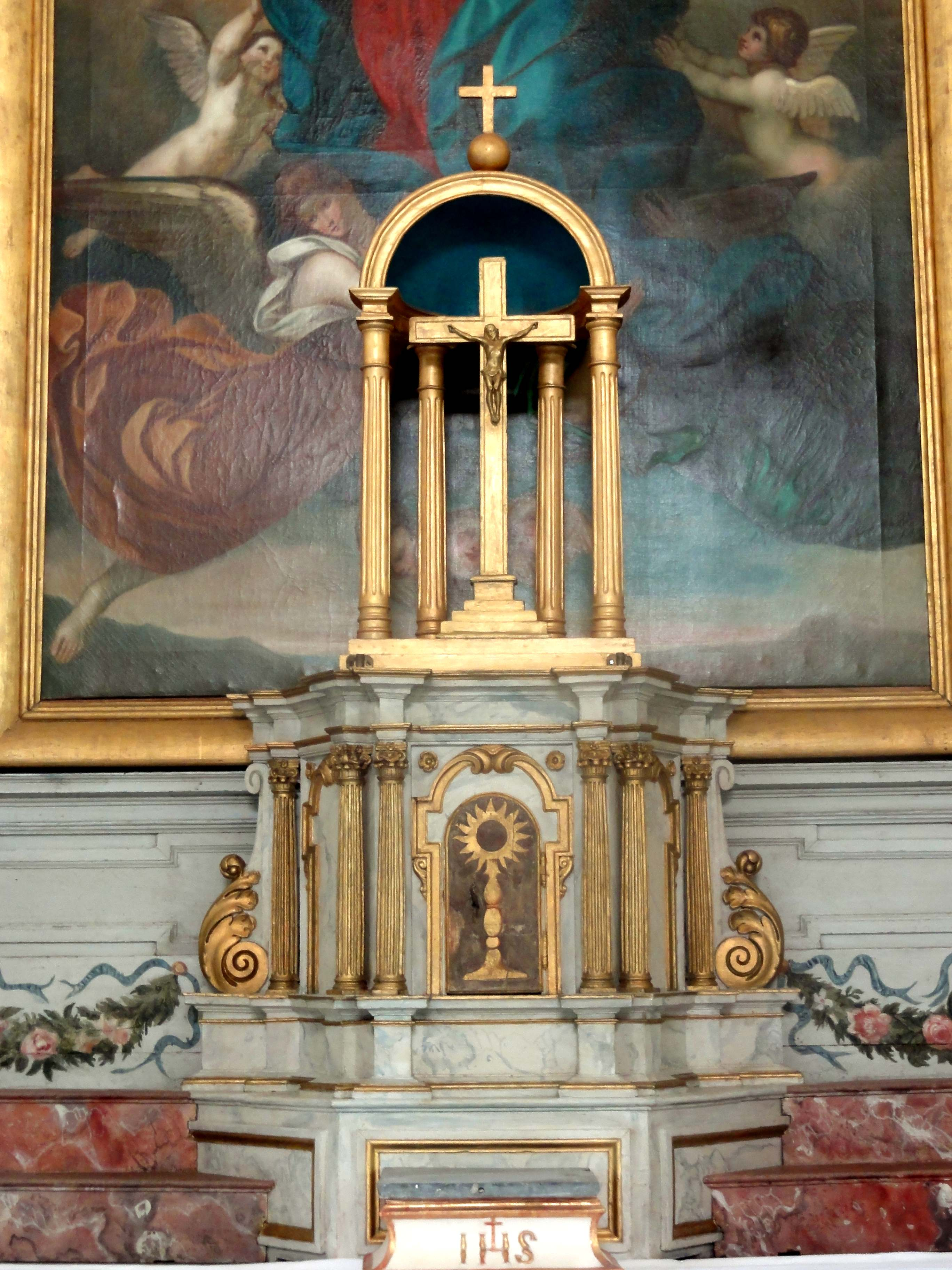 Retable majeur, tabernacle.